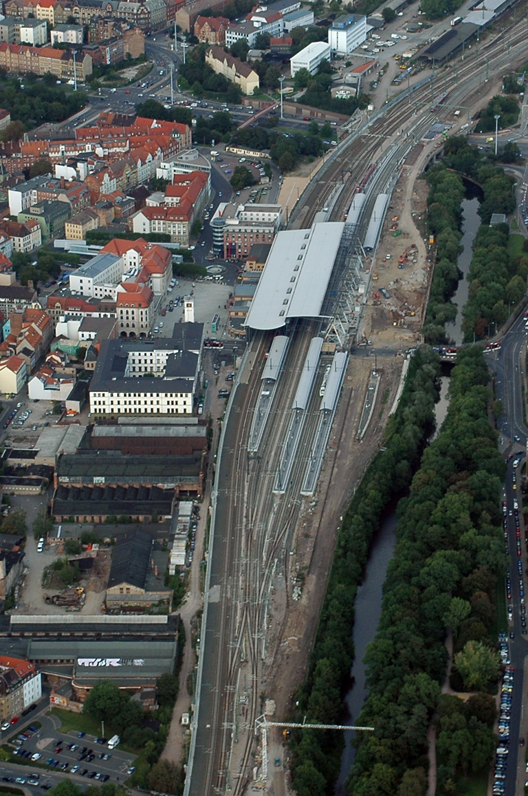 Luftbild vom Erfurter Hauptbahnhof Bauzustand August 2007